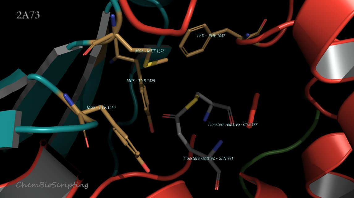 Fattore C3 del Complemento umano - tioestere e sua tasca idrofobica. ID 2A73 del Protein Data Bank, visualizzato in PyMOL 1.7.2.1 (versione open-source).